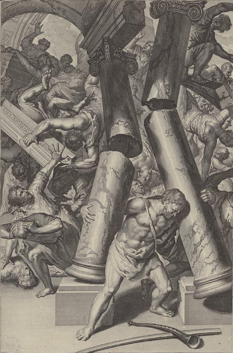 Samson meurt en faisant mourir ses ennemis (extrait du Livres des Juges, XVI, 23-50)